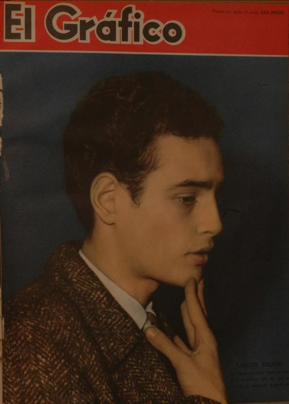 Coberta de la revista El Gráfico:Carlos Bielicki-1959